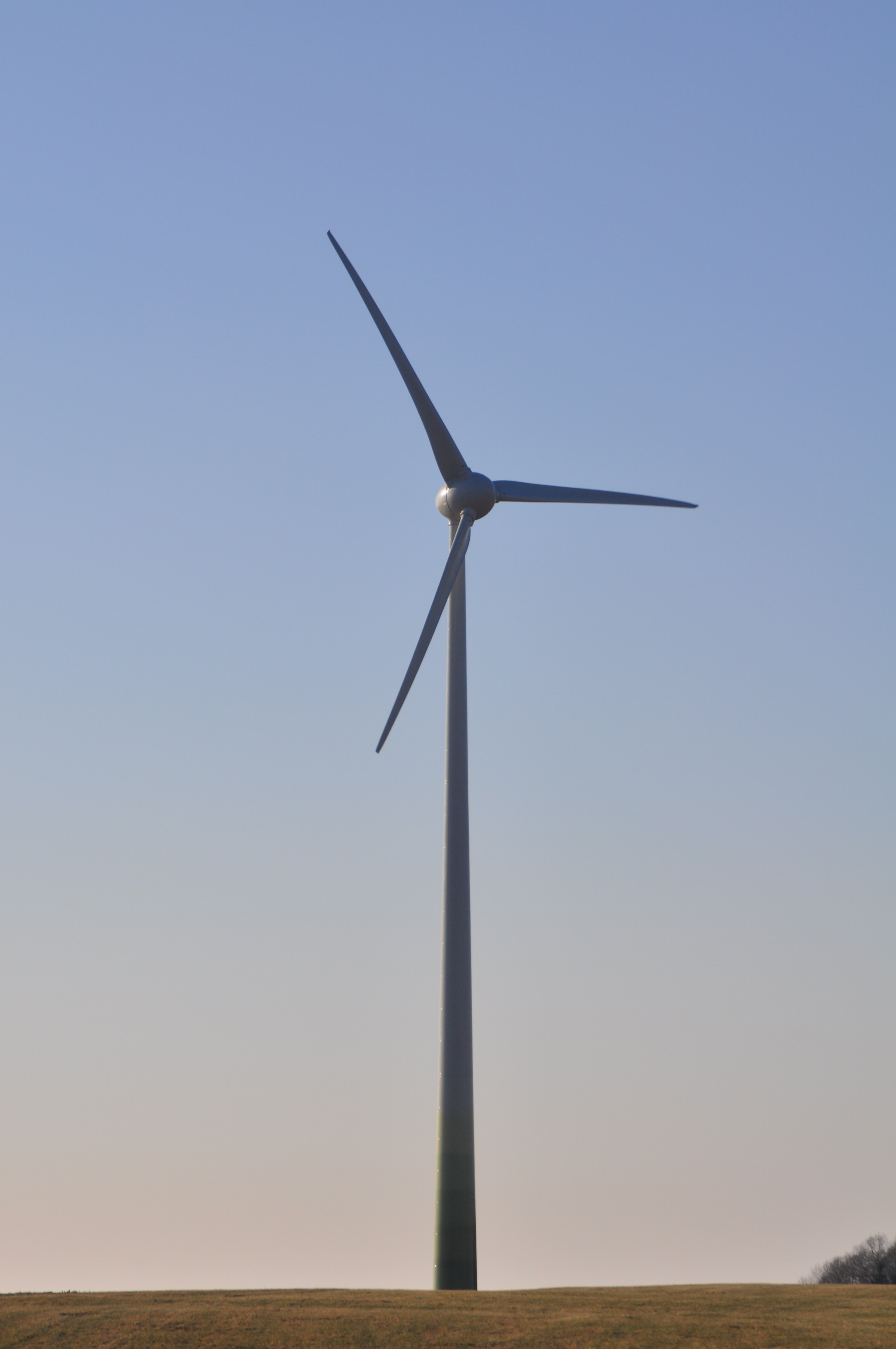 Windpark bei Gebhardshain: Eine der zwei 2011 errichteten Enercon E53 Windkraftanlagen in Fensdorf.